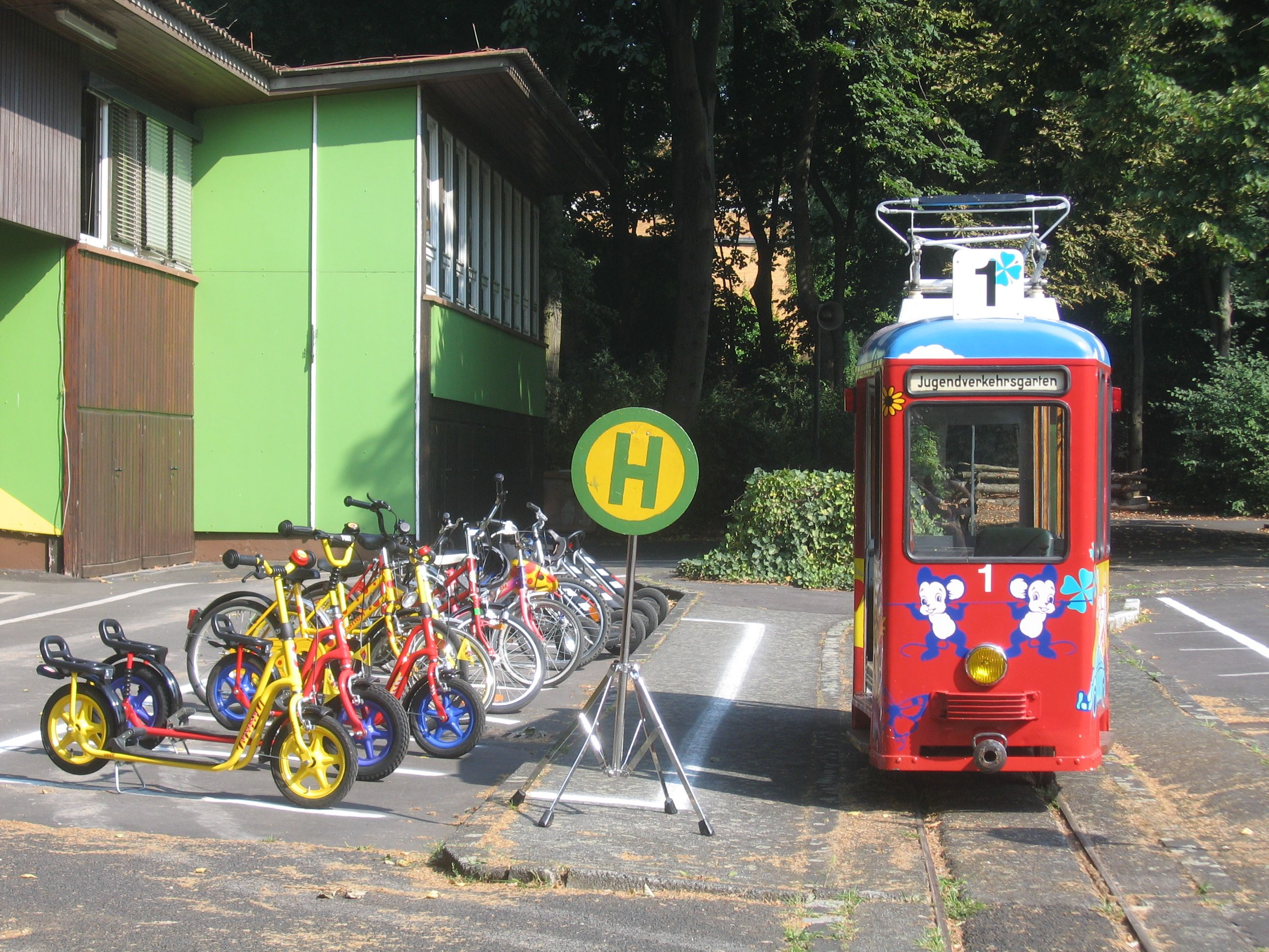 Kinderstraßenbahn in Frankfurt am Main